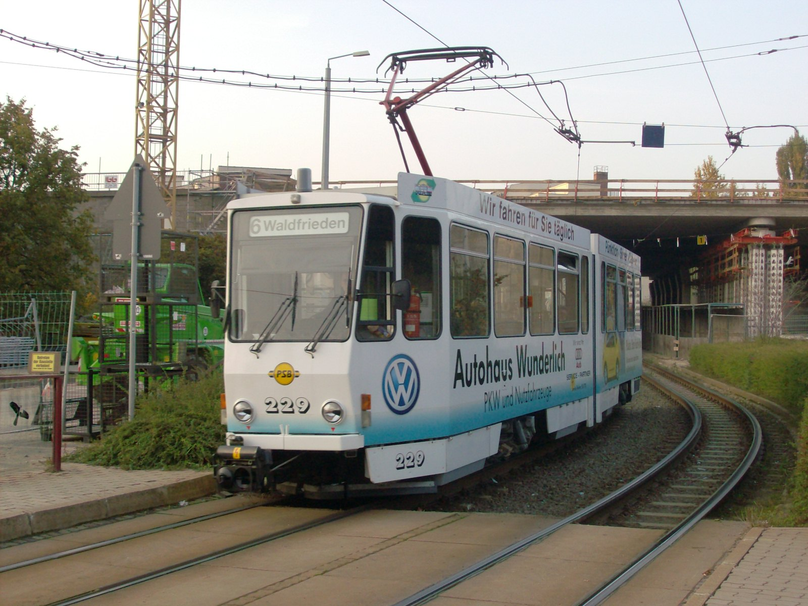 Tw 229 an der Haltestelle Oberer Bahnhof/Pausaer Straße